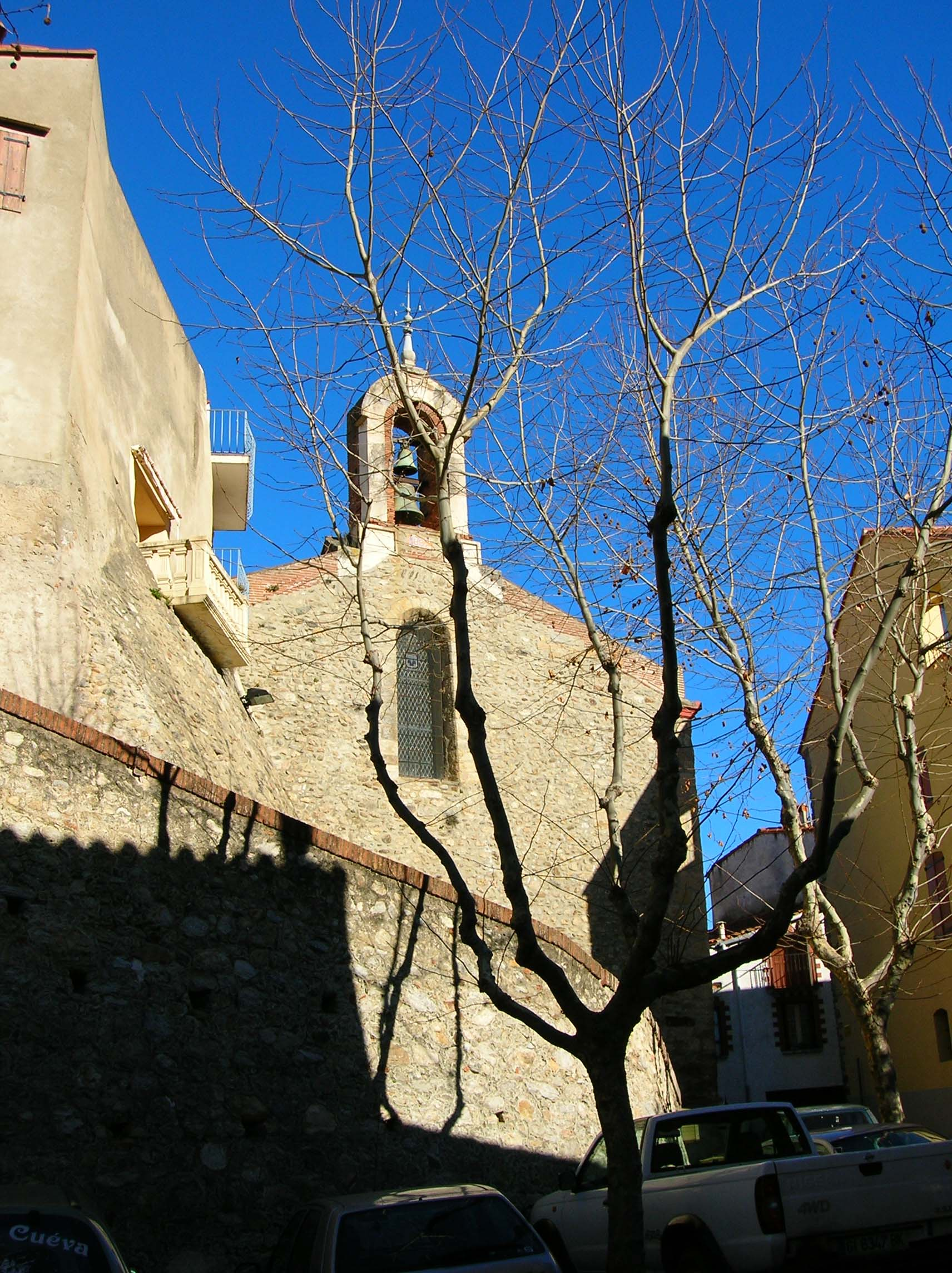 Vue du côté sud de l'église Saint-Félix et Saint-Blaise de Laroque-des-Albères (Pyrénées-Orientales, France).